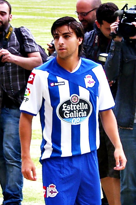 André Bernardes Santos - Deportivo la Coruna